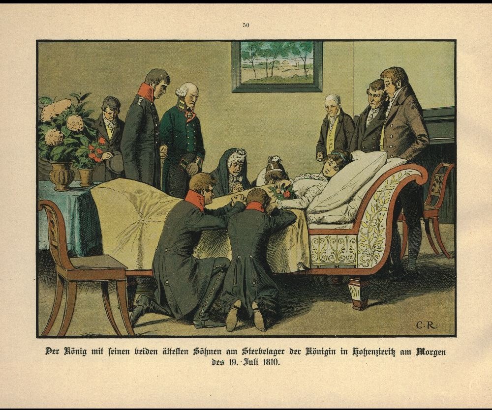 Sterbelager der Königin Luise in Hohenzieritz am Morgen des 19. Juli 1810 (Dying Queen Louise, with her husband King Friedrich Wilhelm III and two of her sons, the later King Friedrich Wilhelm IV and the later Kaiser Wilhelm I)